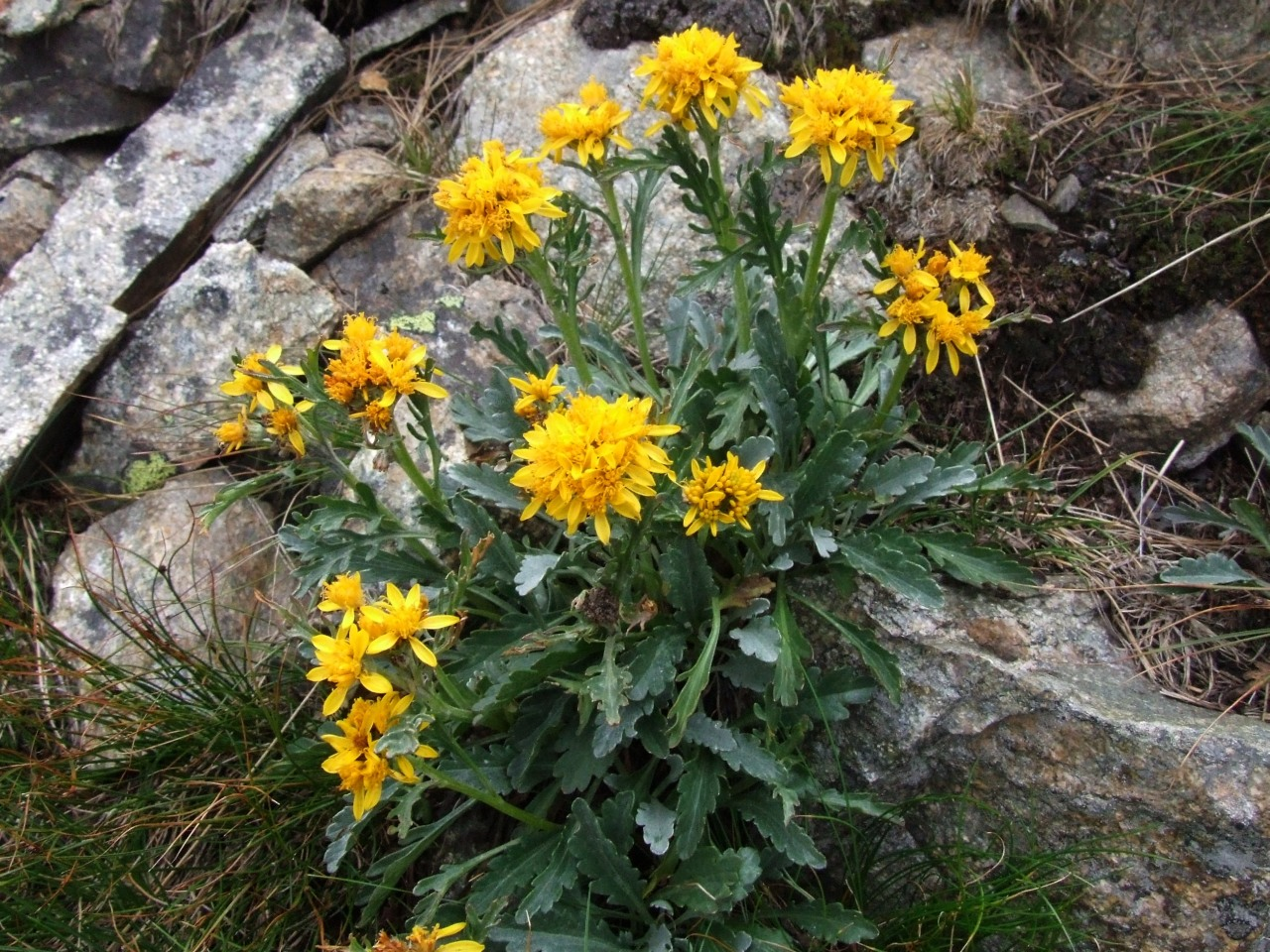 Jacobaea incana subsp. carniolica